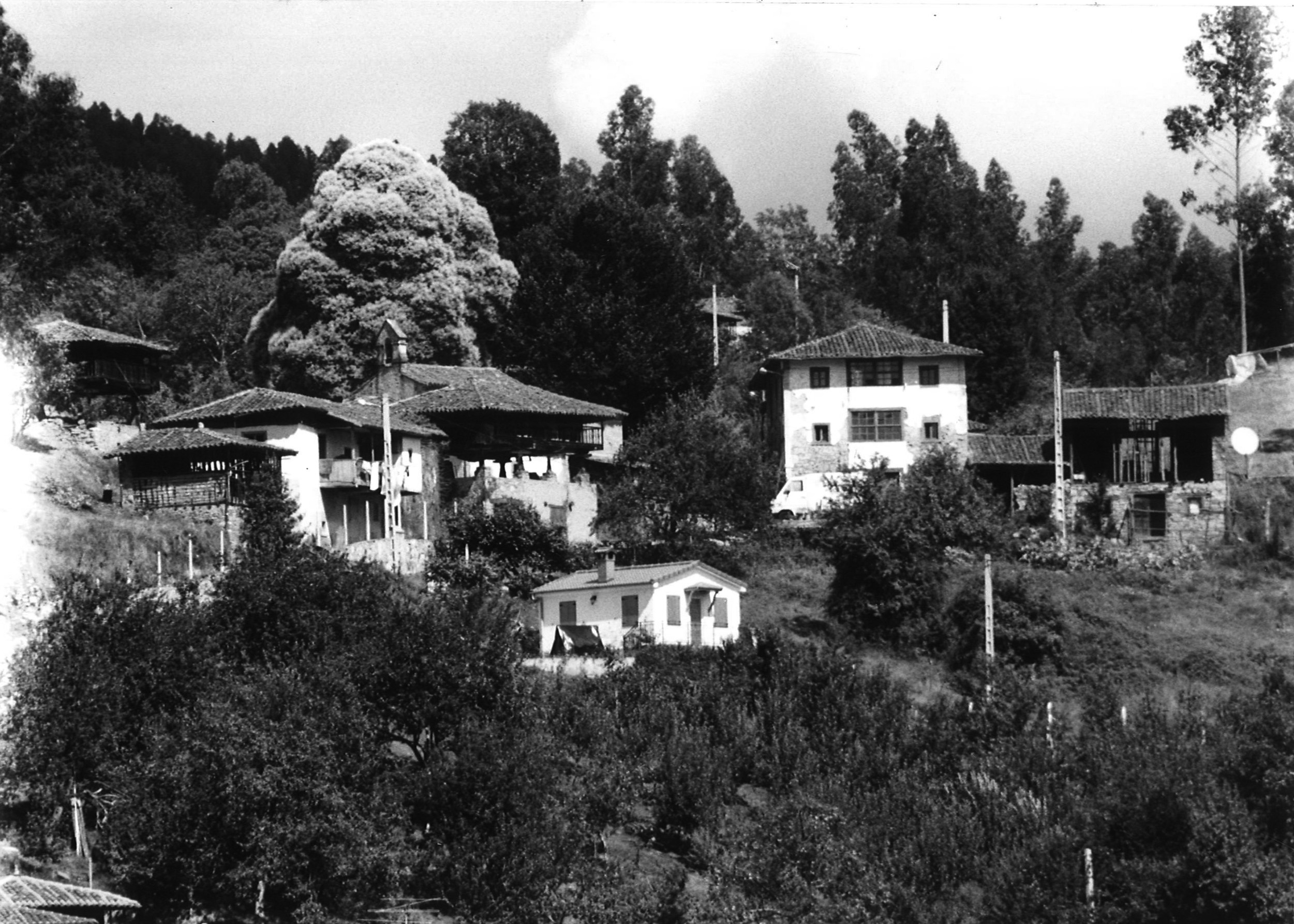 Panorama La Prohida